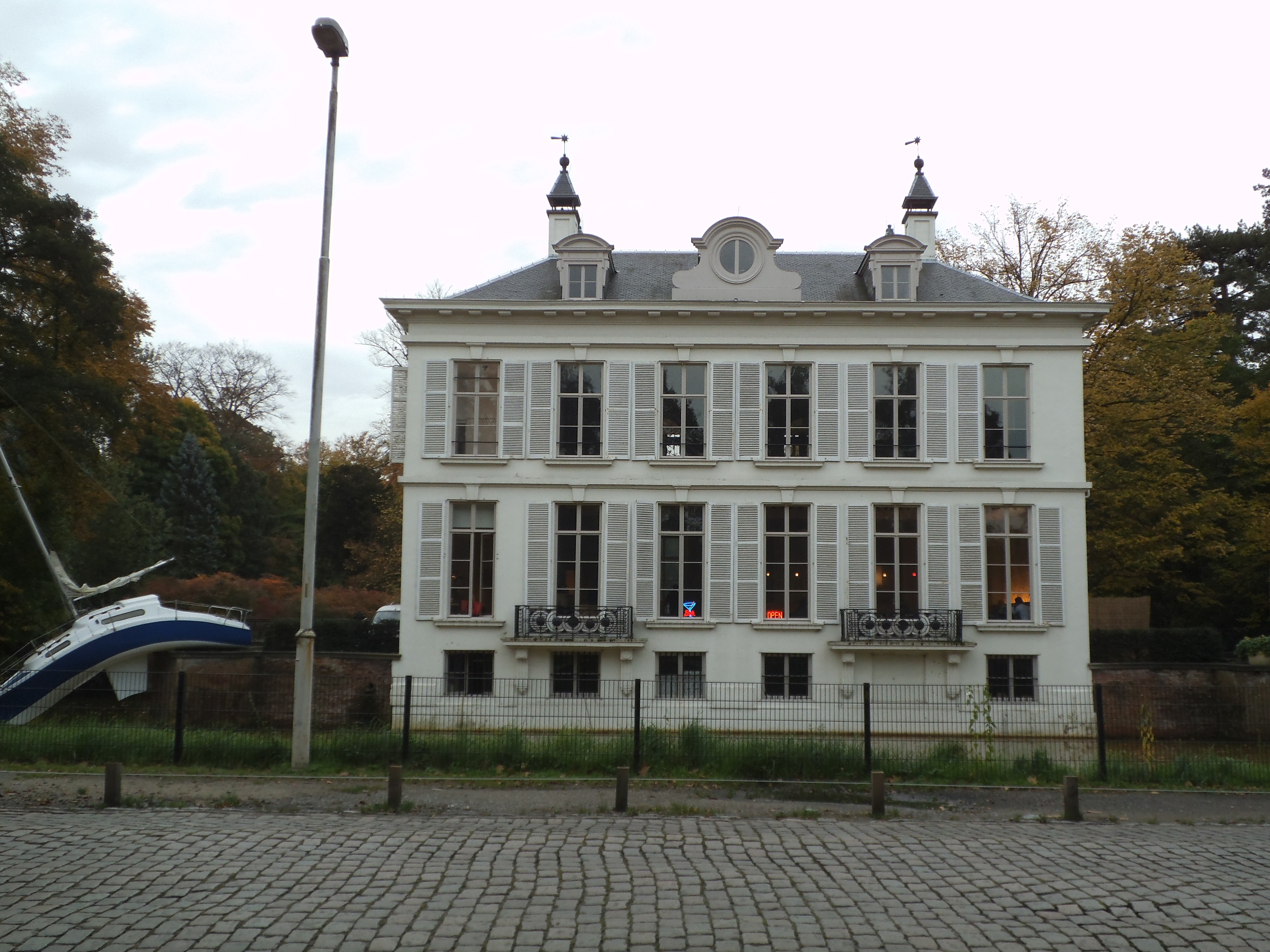 Het neoclassicistische kasteel van Middelheim, Antwerpen. Ontwerp toegeschreven aan Gilles Barnabé Guimard (1731-1805)